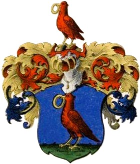 Wangersheimi suguvõsa aadlivapp